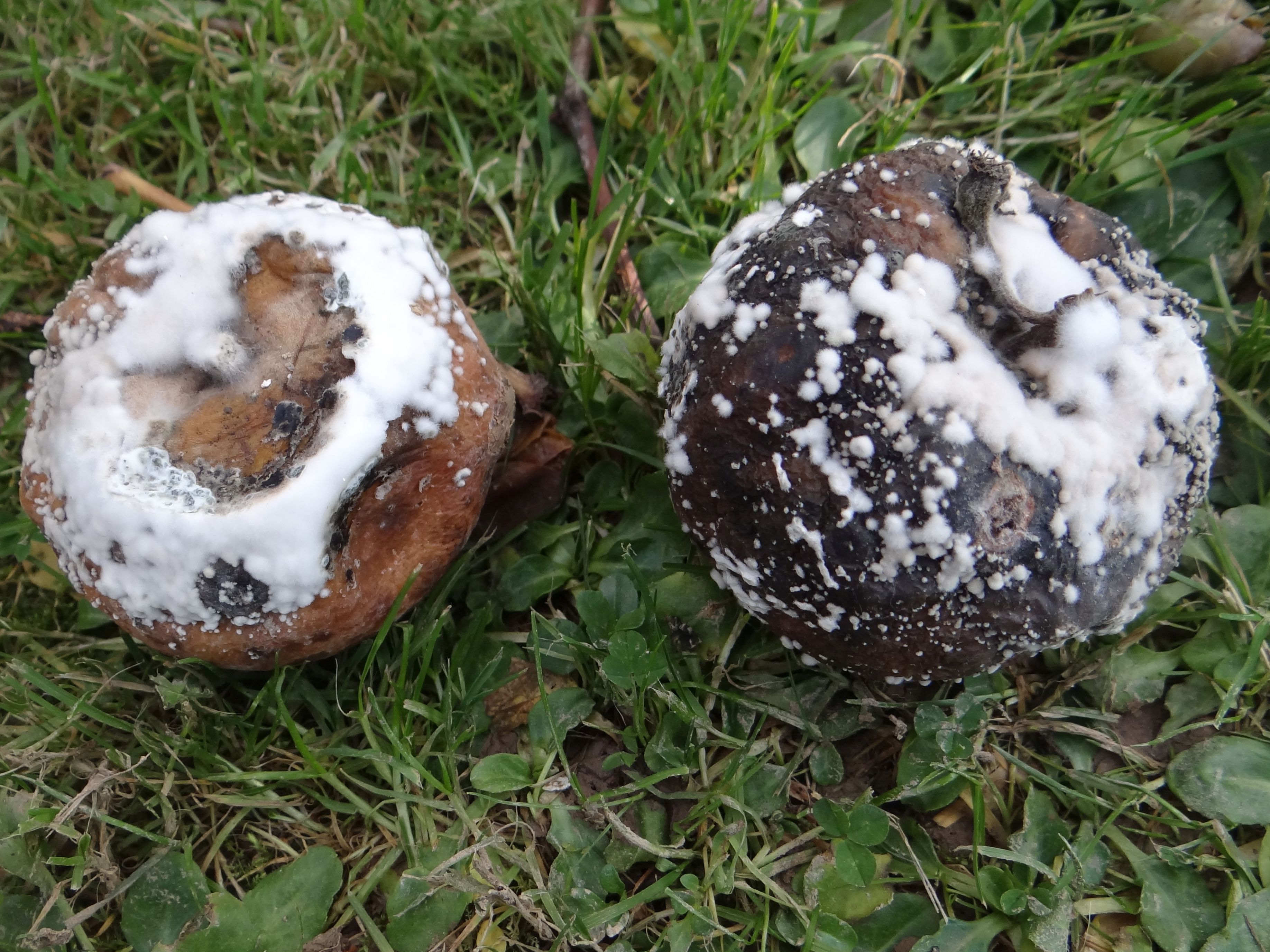 Monilinia fructigena